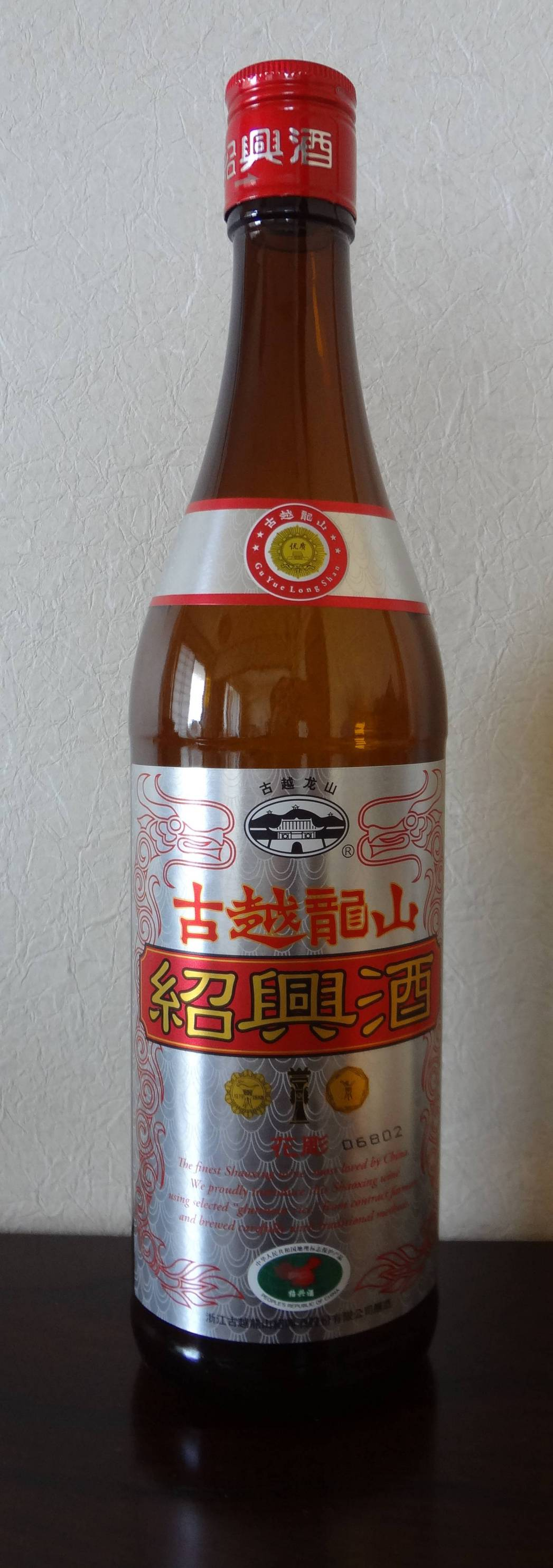 永昌源の古越龍山銀龍